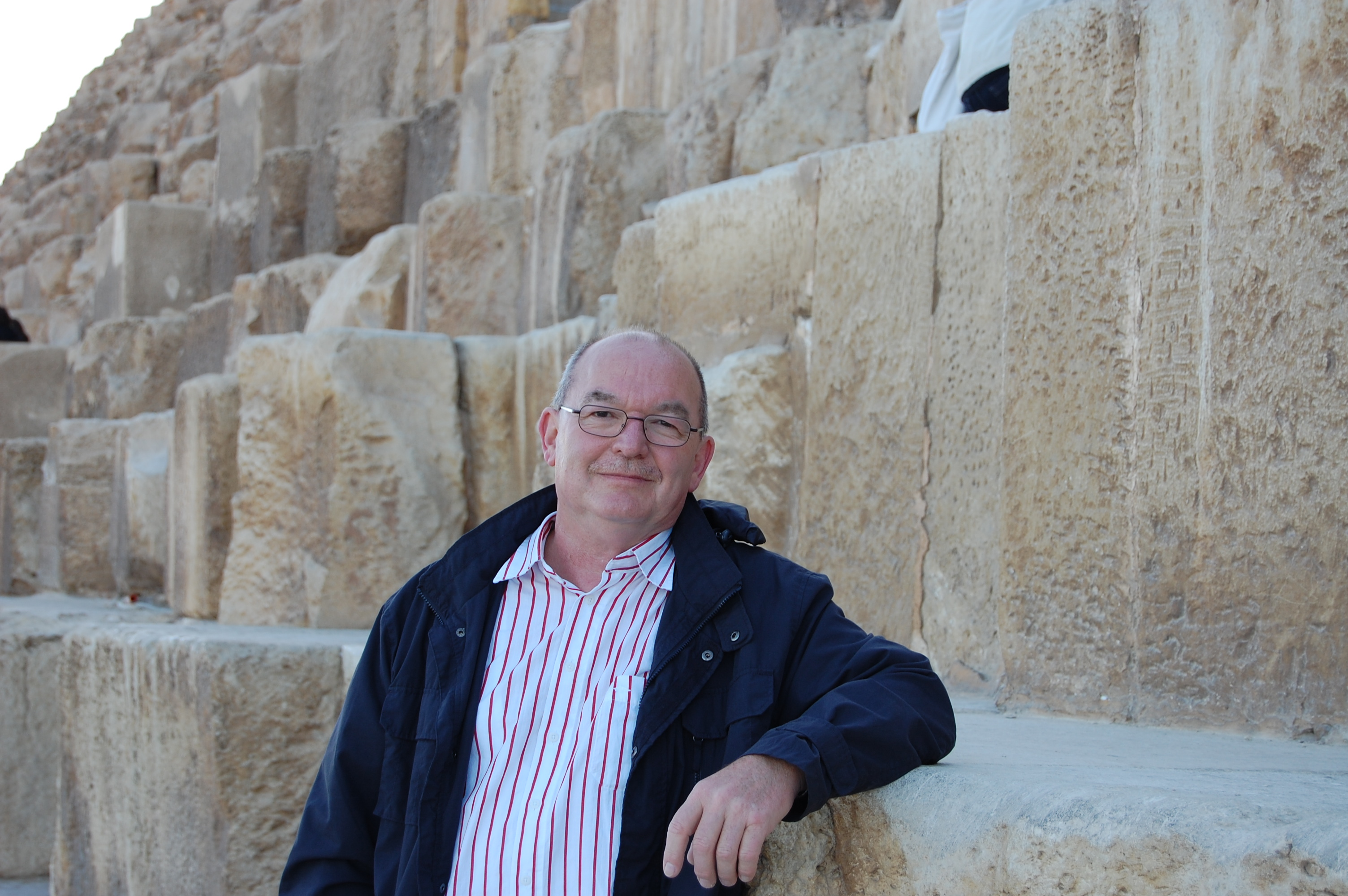 Peter Hertel 2018